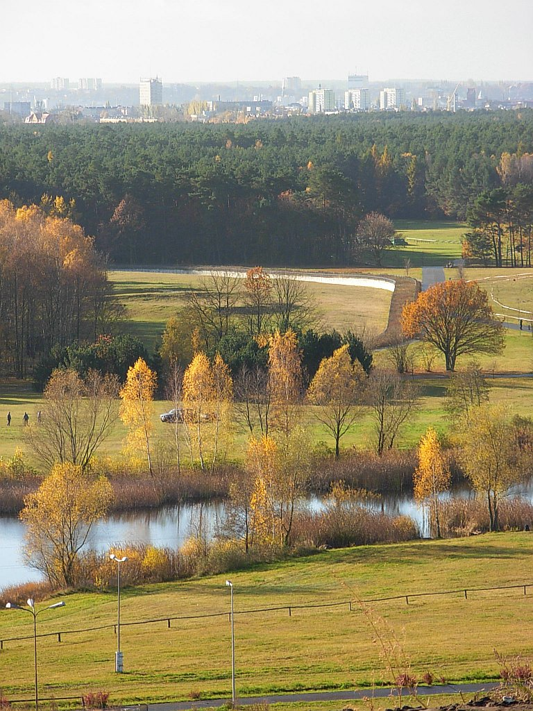 Widok ze wzgórz Myślęcinka